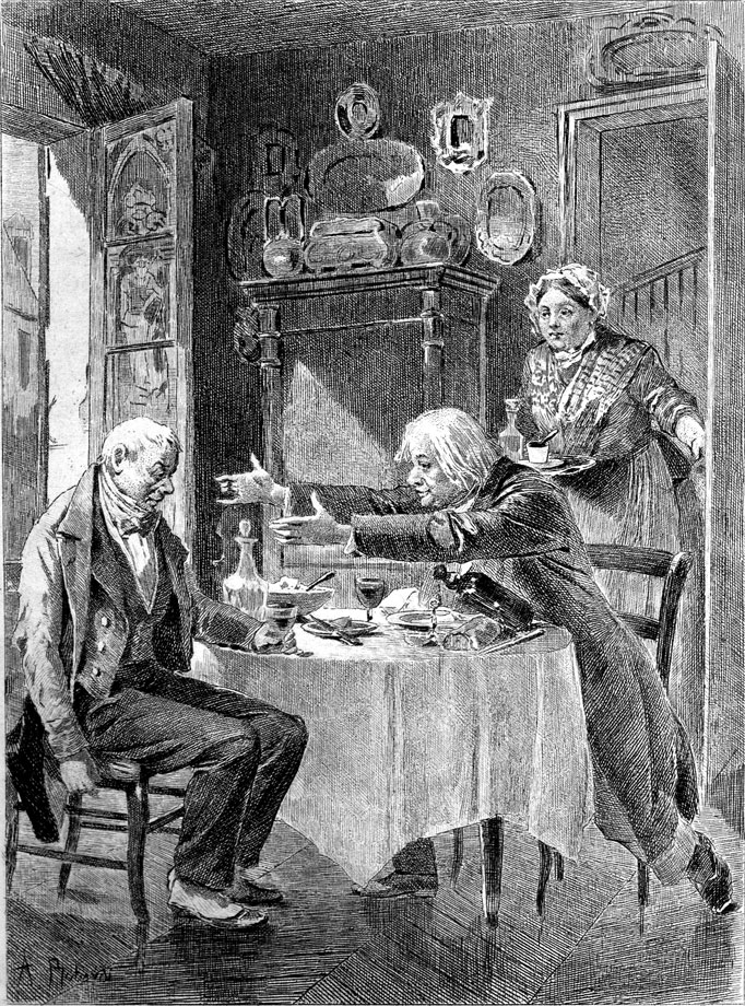 Title page of Honoré de Balzac's Cousin Pons (1847).